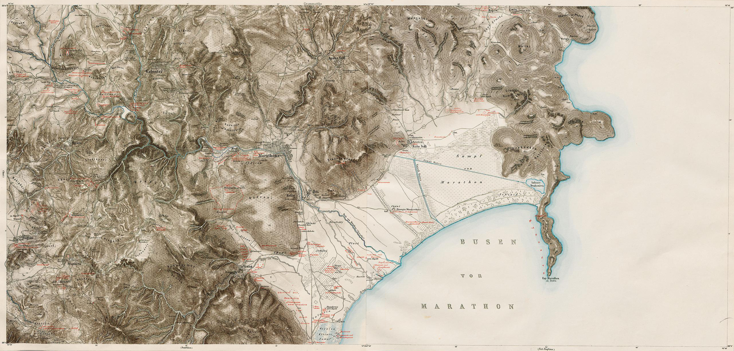 Unione delle mappe file:Curtius & Kaupert, Karten von Attika, Marathon.jpg e file:Curtius & Kaupert, Karten von Attika, Drakonera.jpg